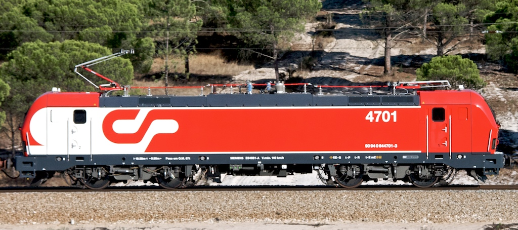 à frente de um comboio de contentores [81381/0: Bobadela - Sines]. Local: Alcácer do Sal [Linha do Sul, PK 86] Data e hora: 2 de Outubro de 2008 [16h35] Material: Locomotiva 4701 [Siemens]